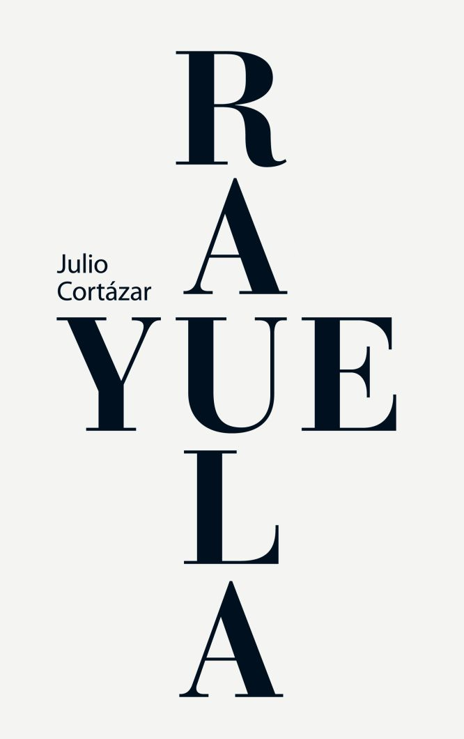 Versión simplificada de la portada de Rayuela de 2013 publicada por Editorial Alfaguara.